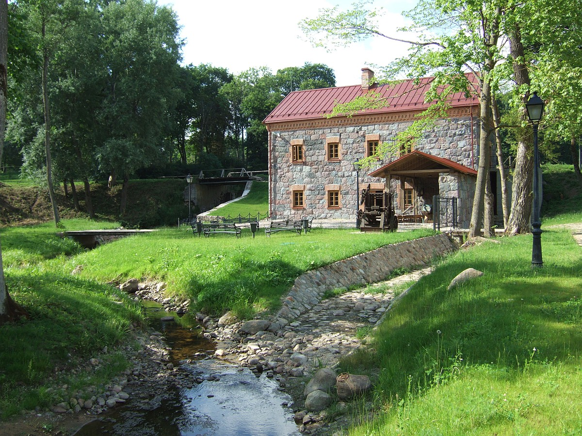 Liubavo malūnas-muziejus